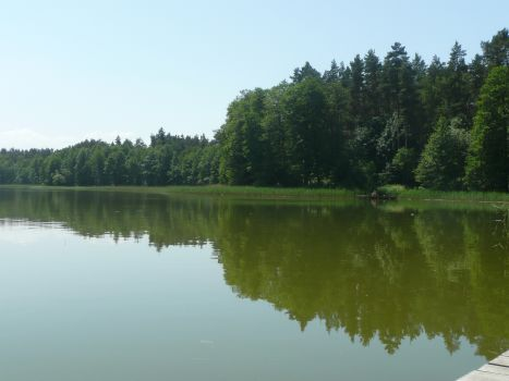 Jezioro Tyrkło, Okartowo